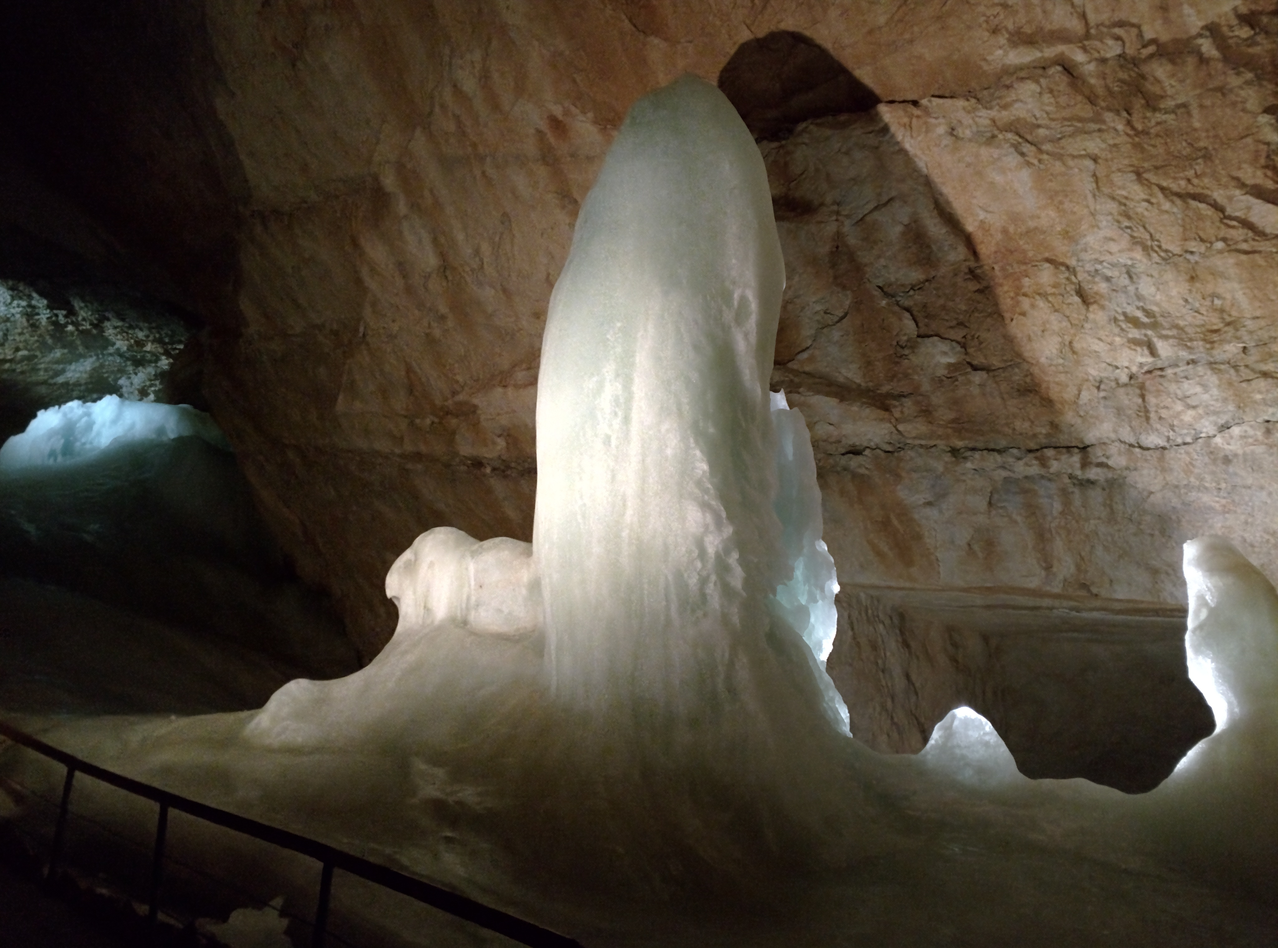 Ice Caves of Dachsteinhöhlen